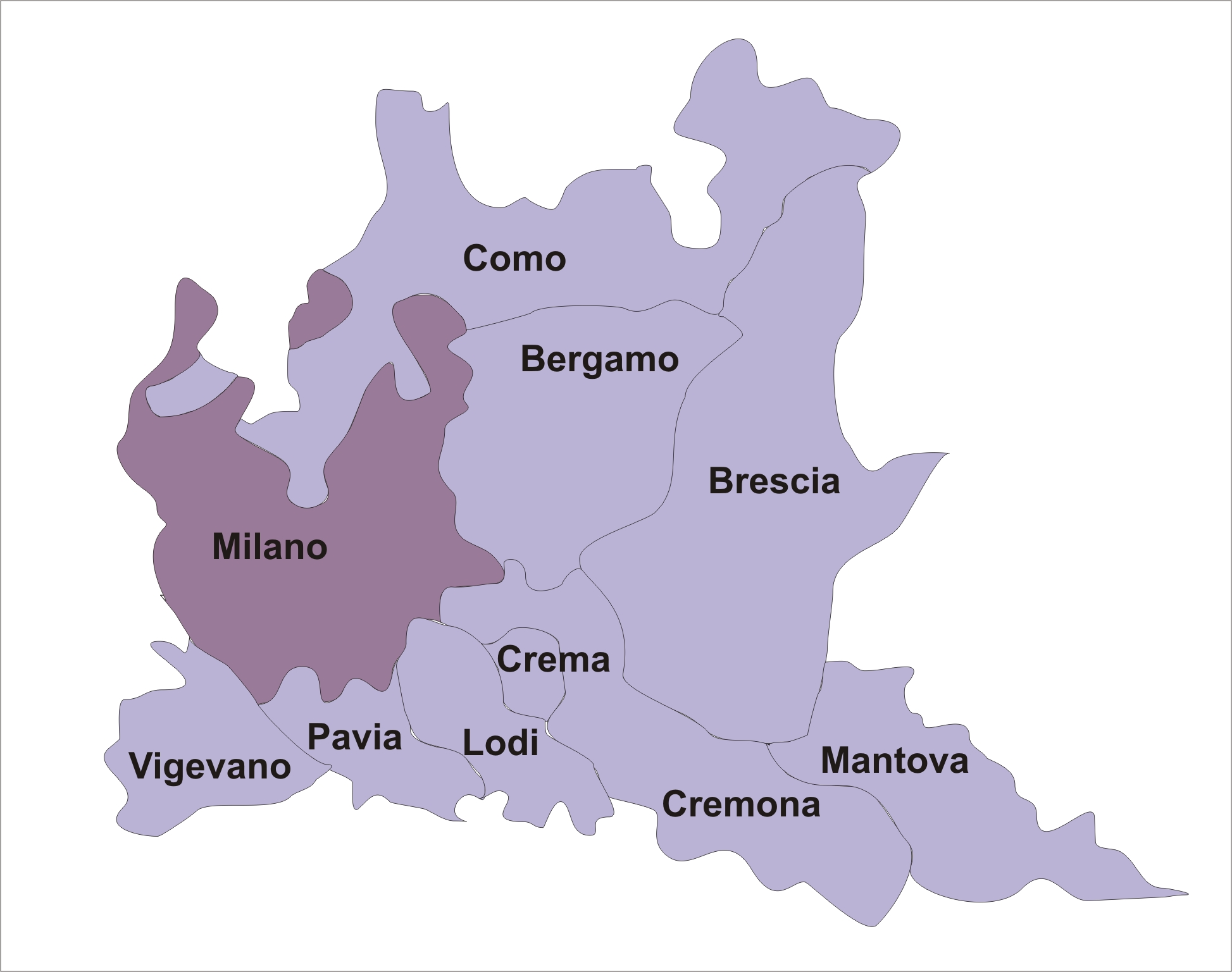 Mapa de la regió eclesiàstica Llombardia